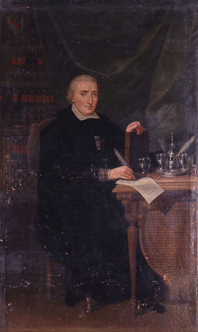 Retrato de D. Ciriaco González Carvajal (1745-post.1828).